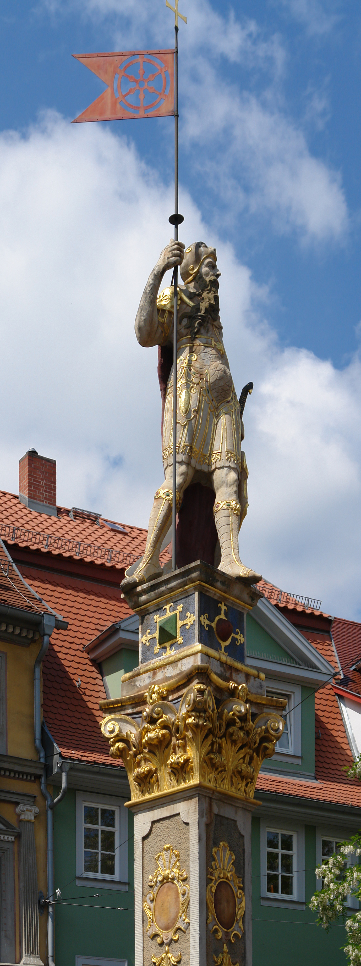 Erfurt,Thuringia, Germany Herold auf dem Fischmarkt